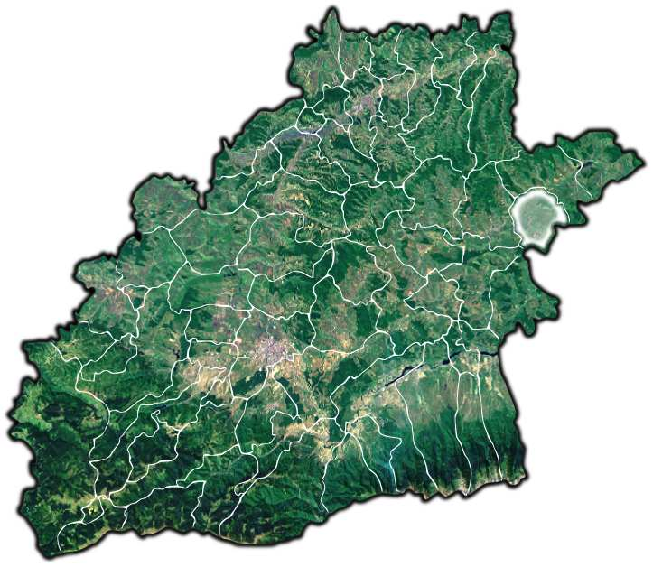 Merghindeal jud Sibiu